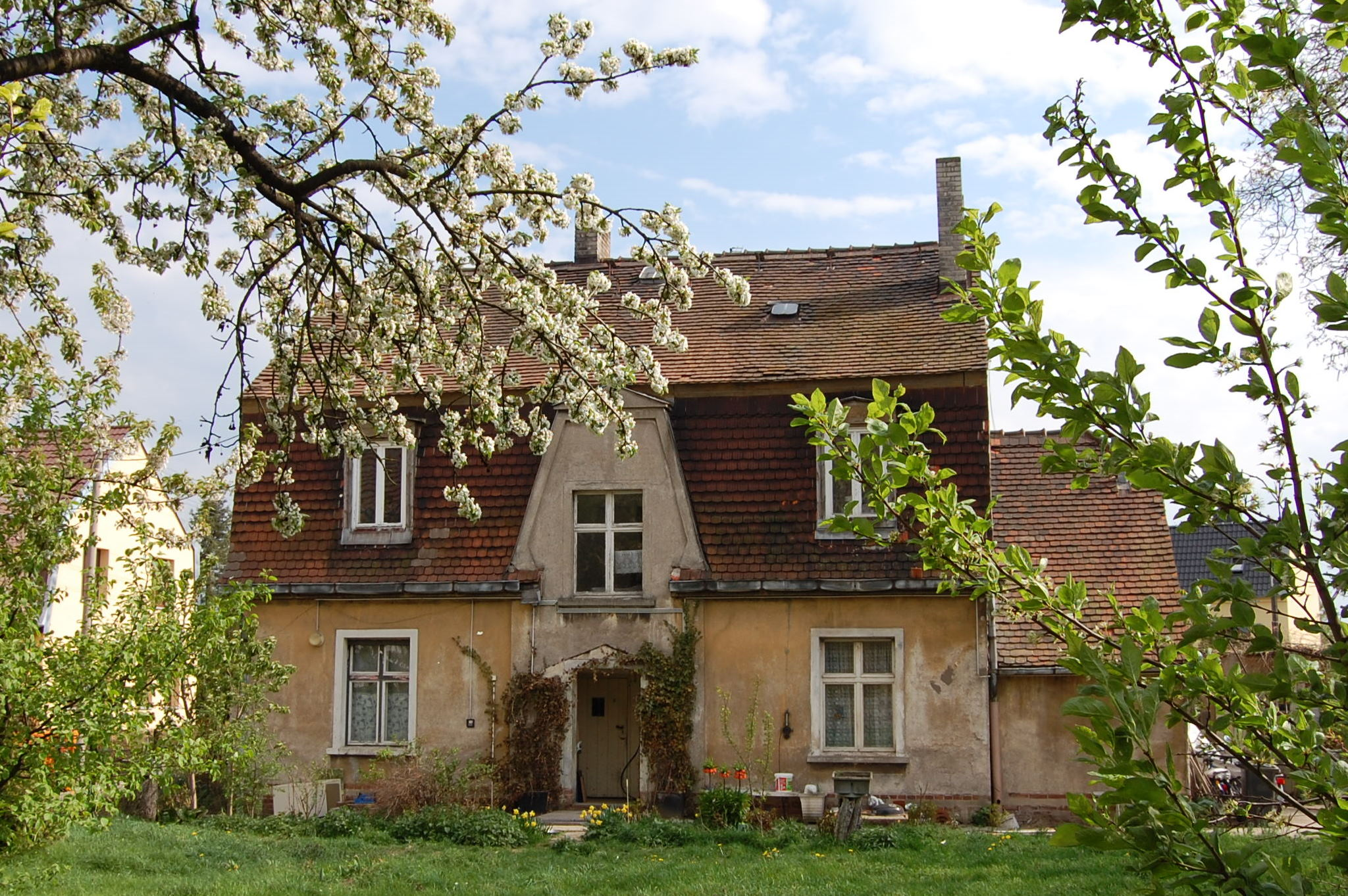 Wolfsfelde, nicht saniertes Haus in der Sülldorfer Straße